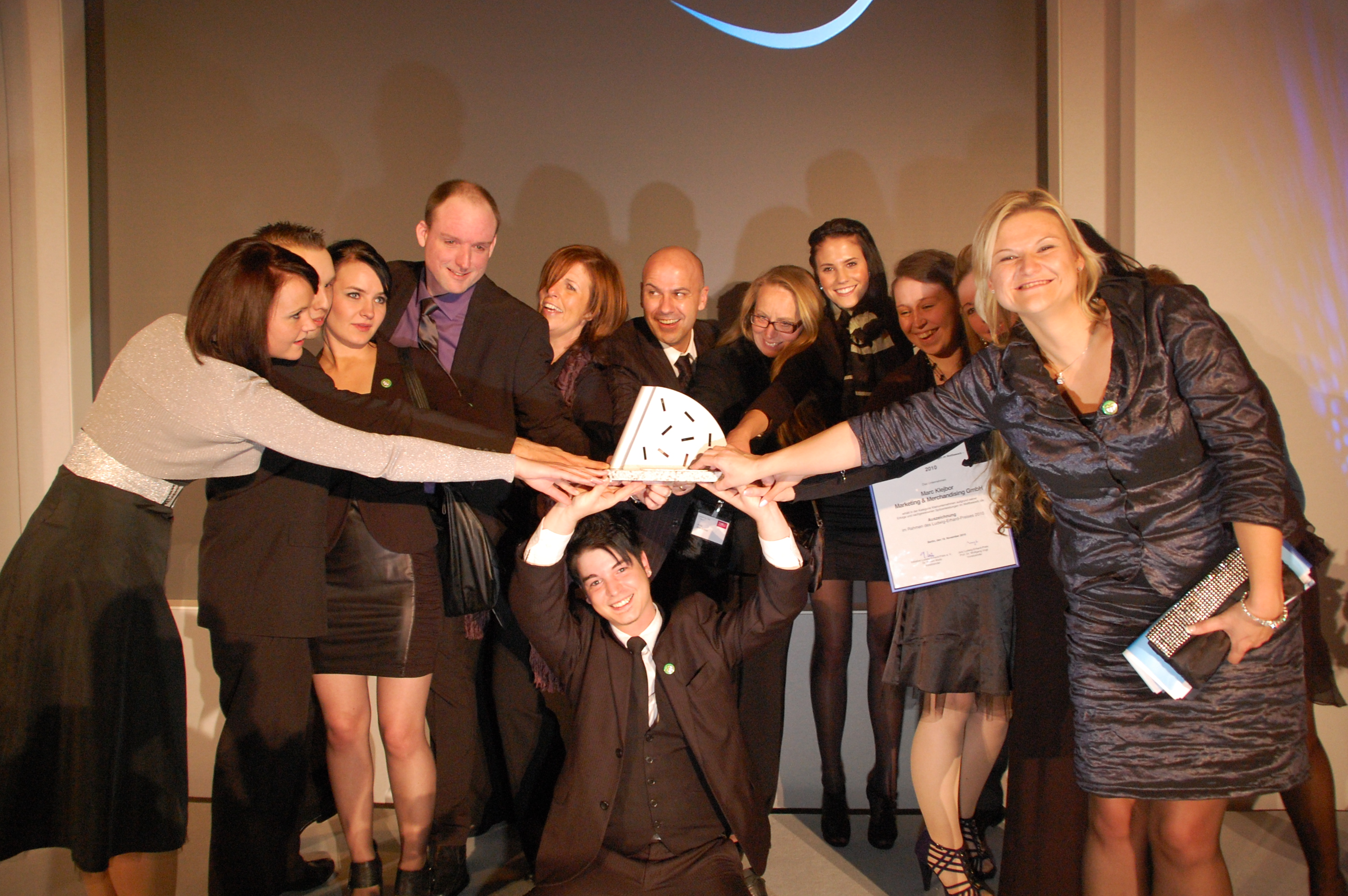 Marc Klejbor (Mitte oben) und Teammitglieder bei der Verleihung des Ludwig-Erhard-Preises 2010